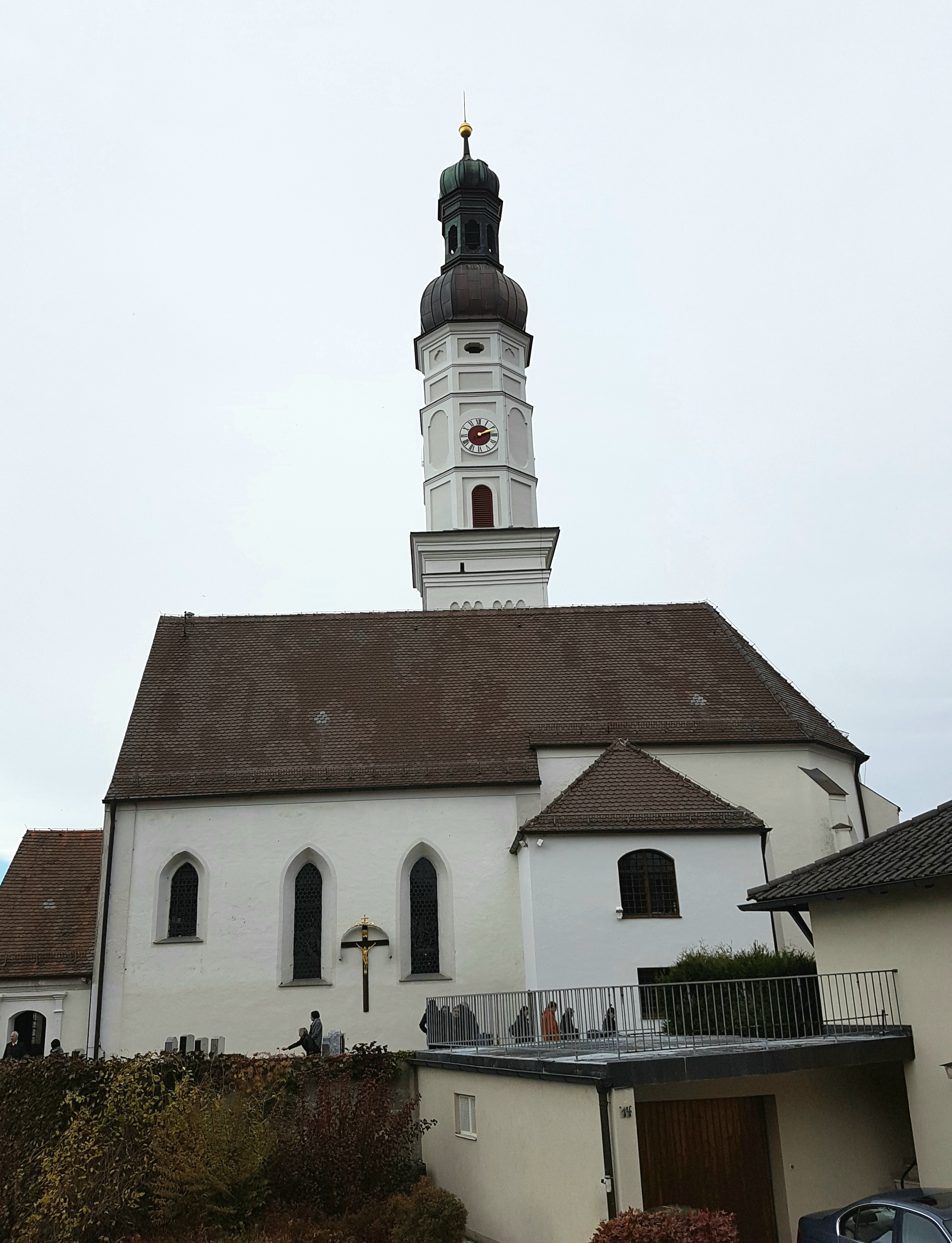 Mariä Verkündigung (Niederscheyern)